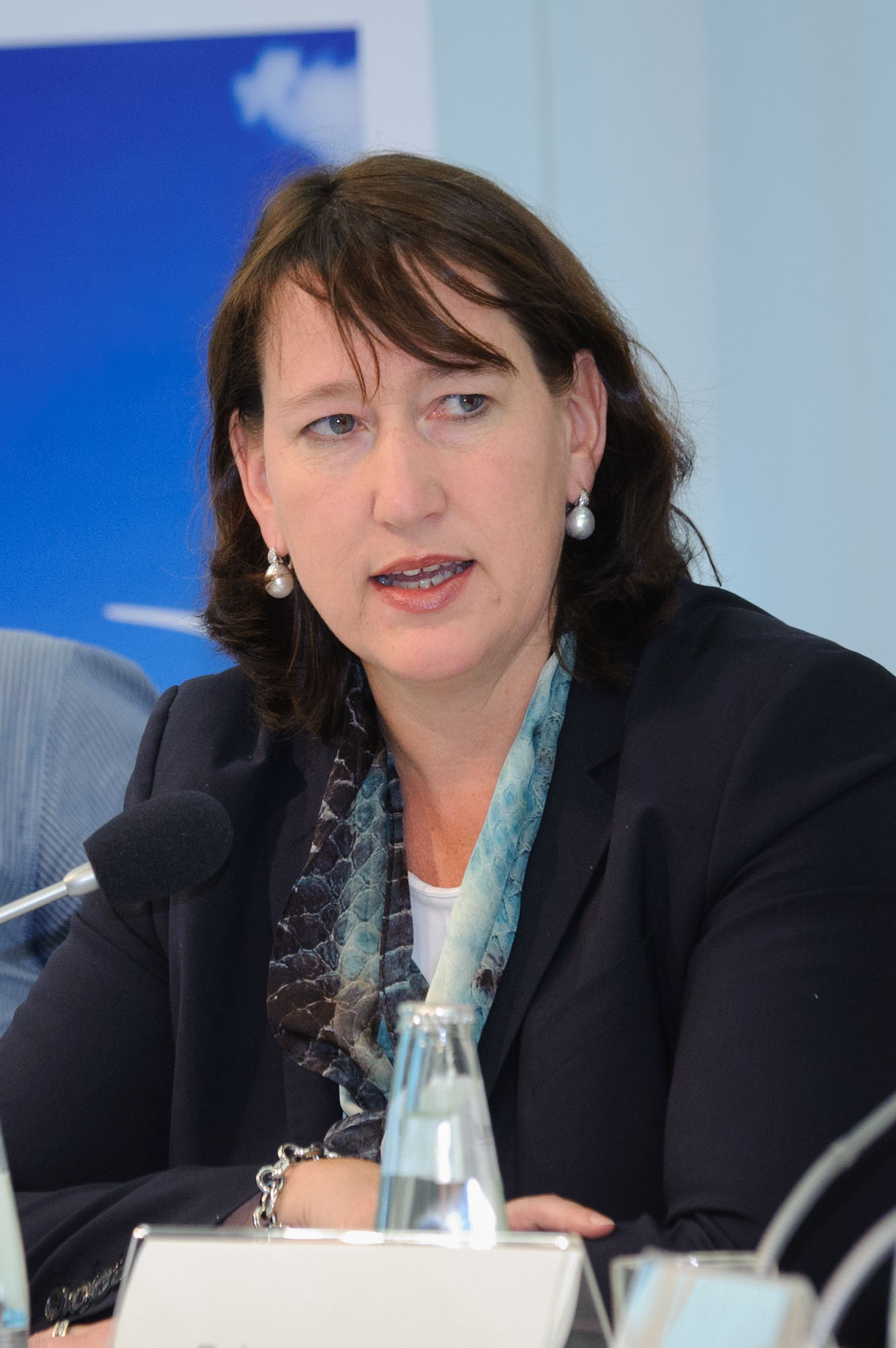 Hildegard Müller (Hauptgeschf. d. Bundesverband der Wasser- und Energiewirtschaft)